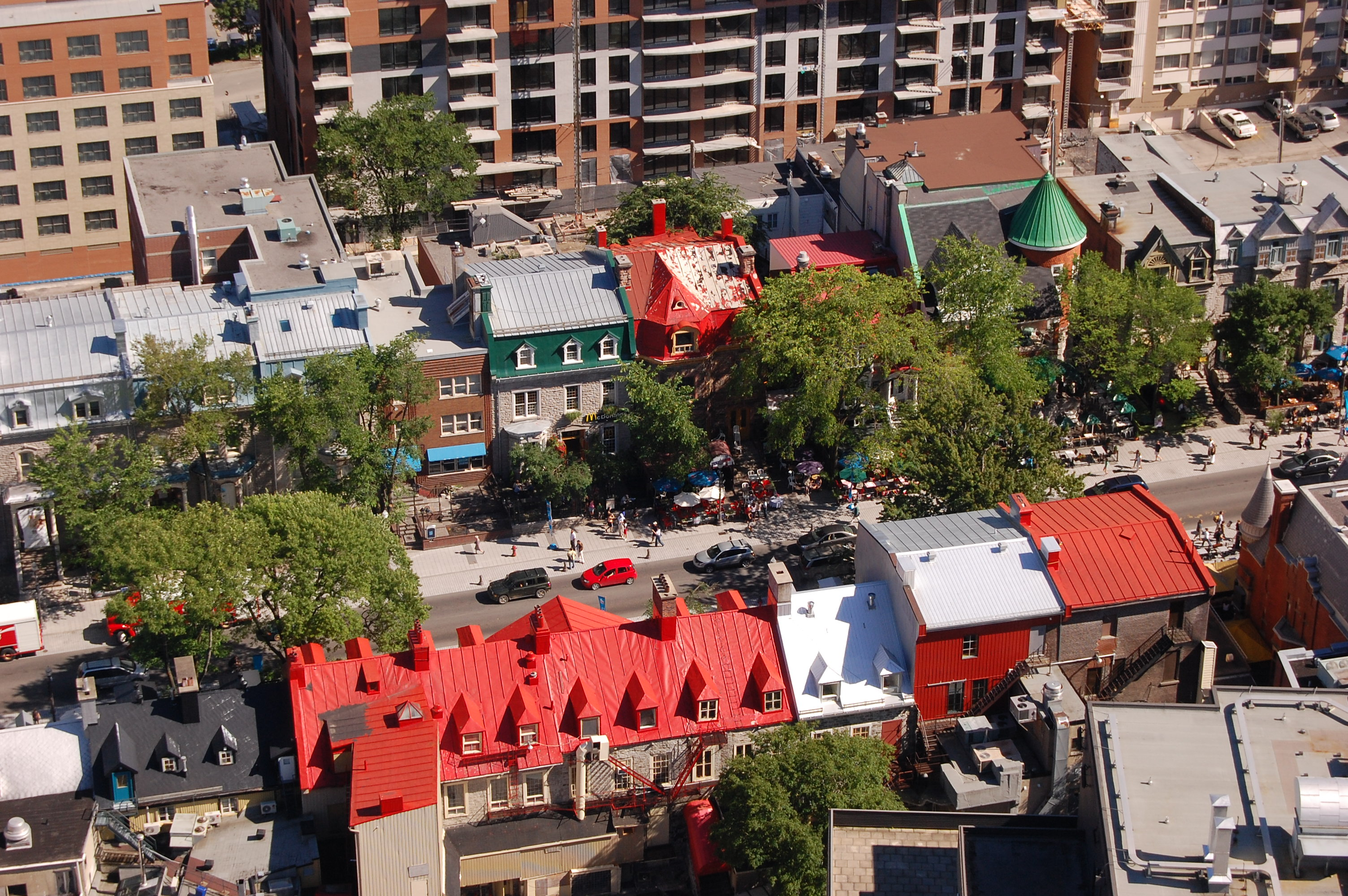 Mélange de styles architecturaux sur la Grande Allée à Québec (ville), Québec, Canada